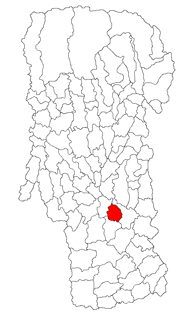 Categorie:Hărţi ale judeţului Argeş